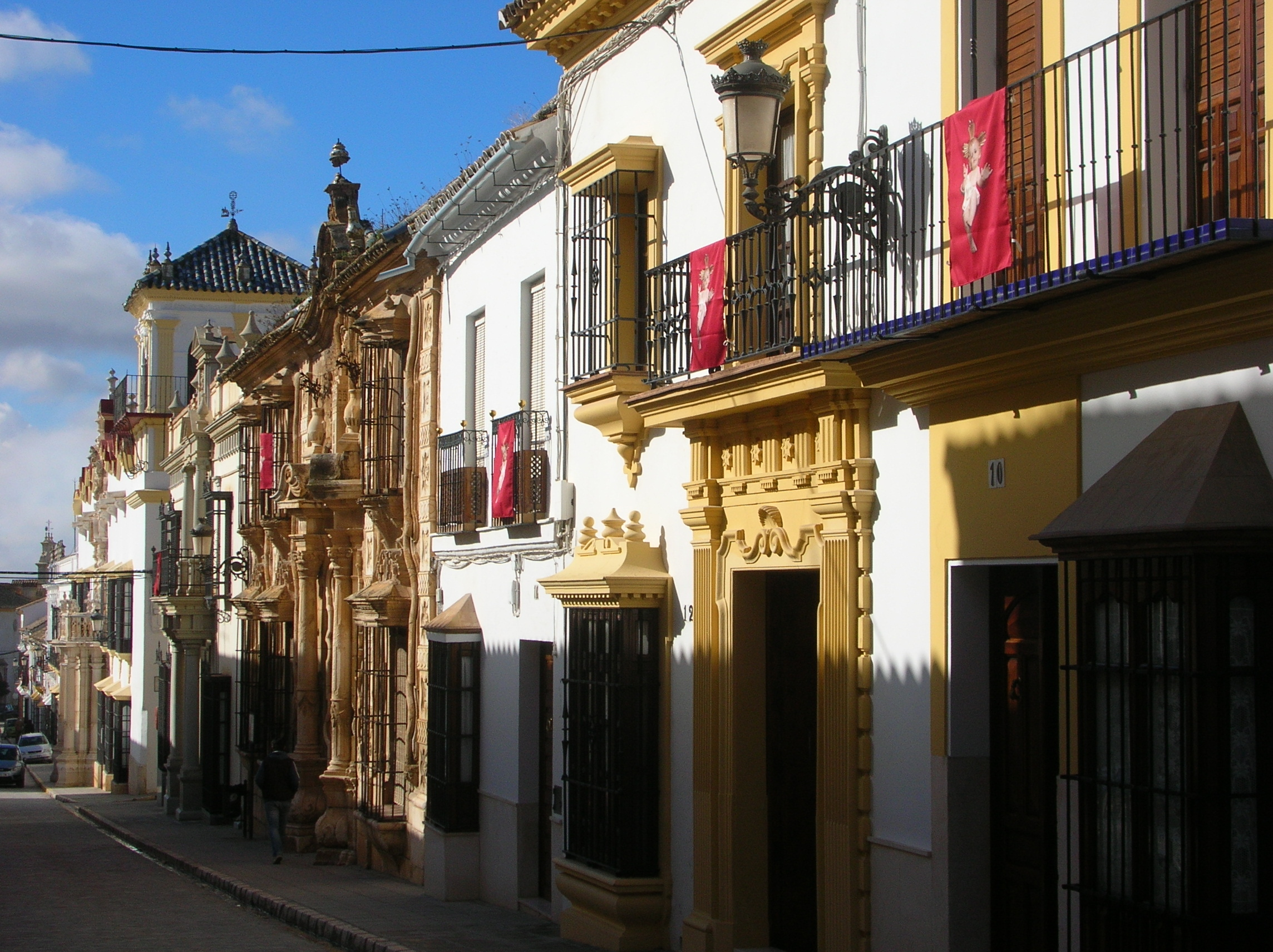 La Rue San Pedro d'Osuna (Andalousie, Espagne)